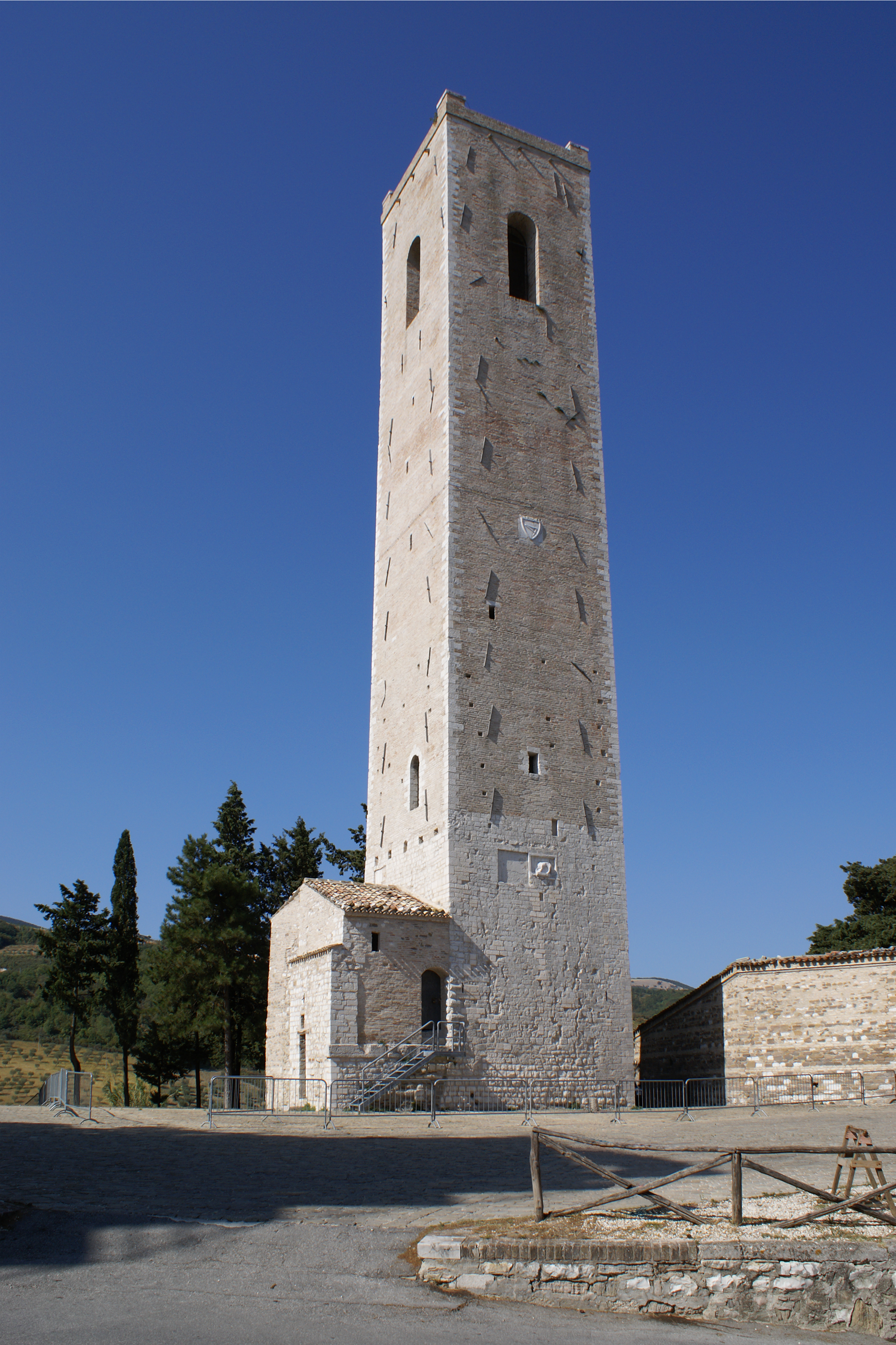 Torre Civica This is a photo of a monument which is part of cultural heritage of Italy.